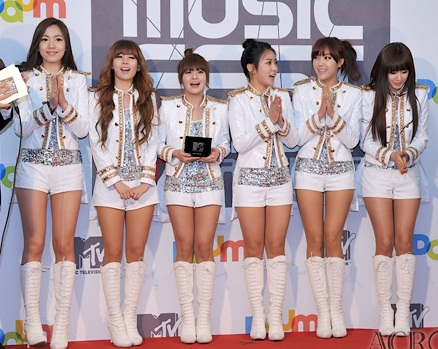 티아라. 2011년 2월, MTV-DAUM 뮤직 페스트에서.